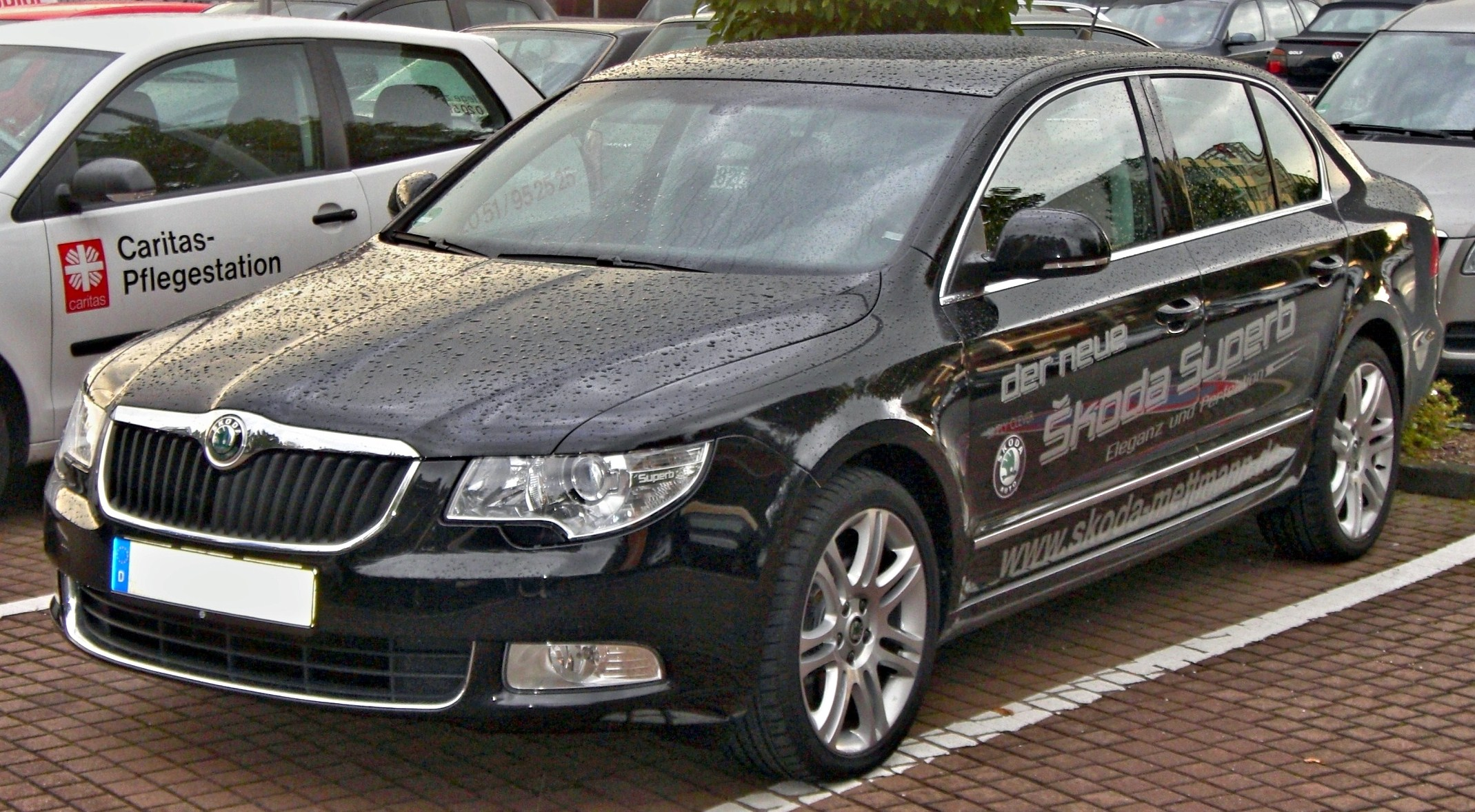 Skoda Superb